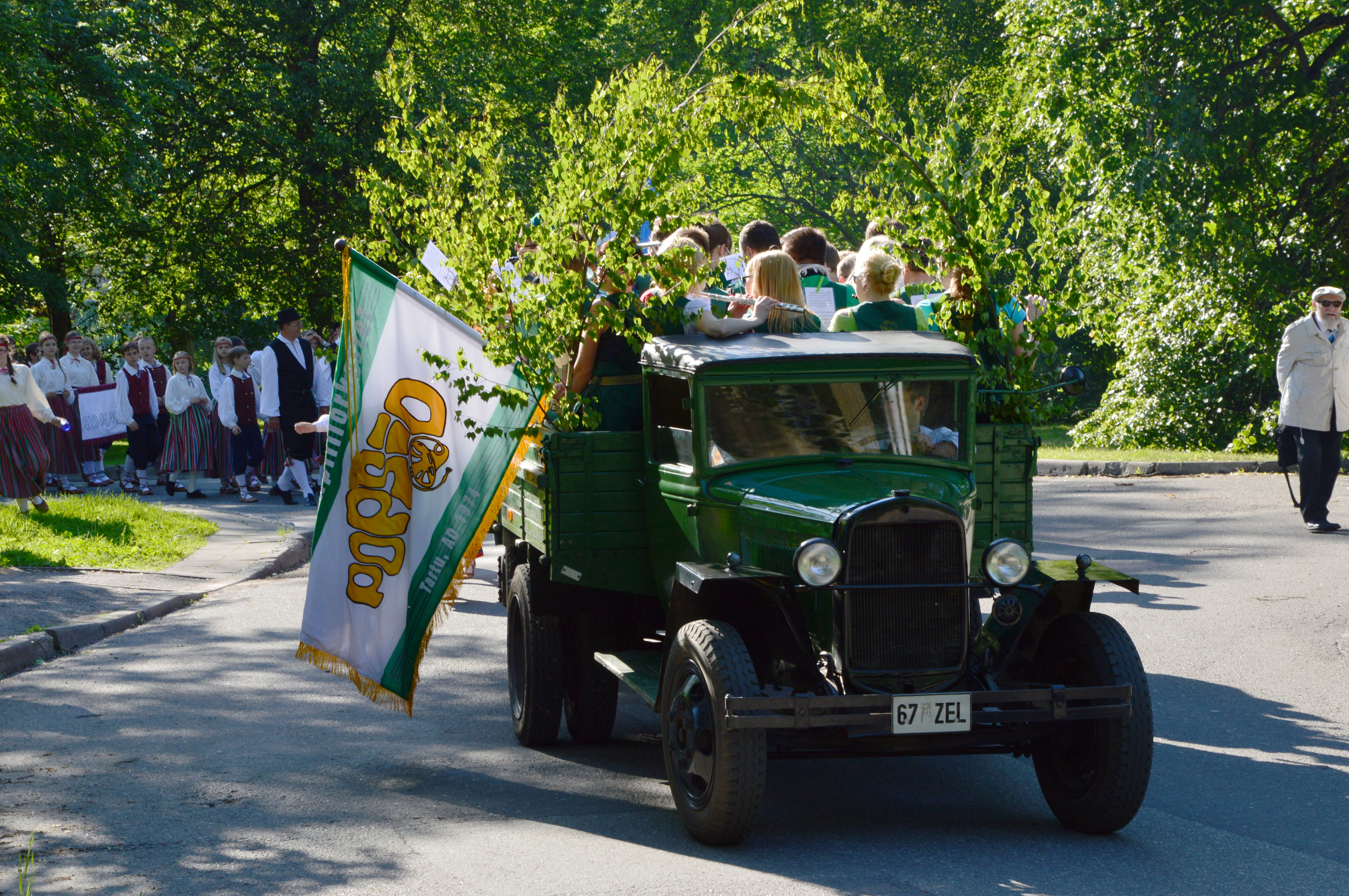 Popsid Tartu laulupeo rongkäigus 2014. aastal.